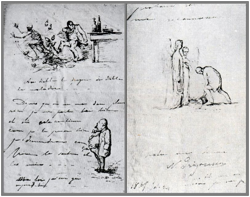 Scrisoarea adresată lui V.A. Urechia de către Nicolae Grigorescu din data de 24 septembrie 1869 - Cabinetul de stampe al Academiei Române.